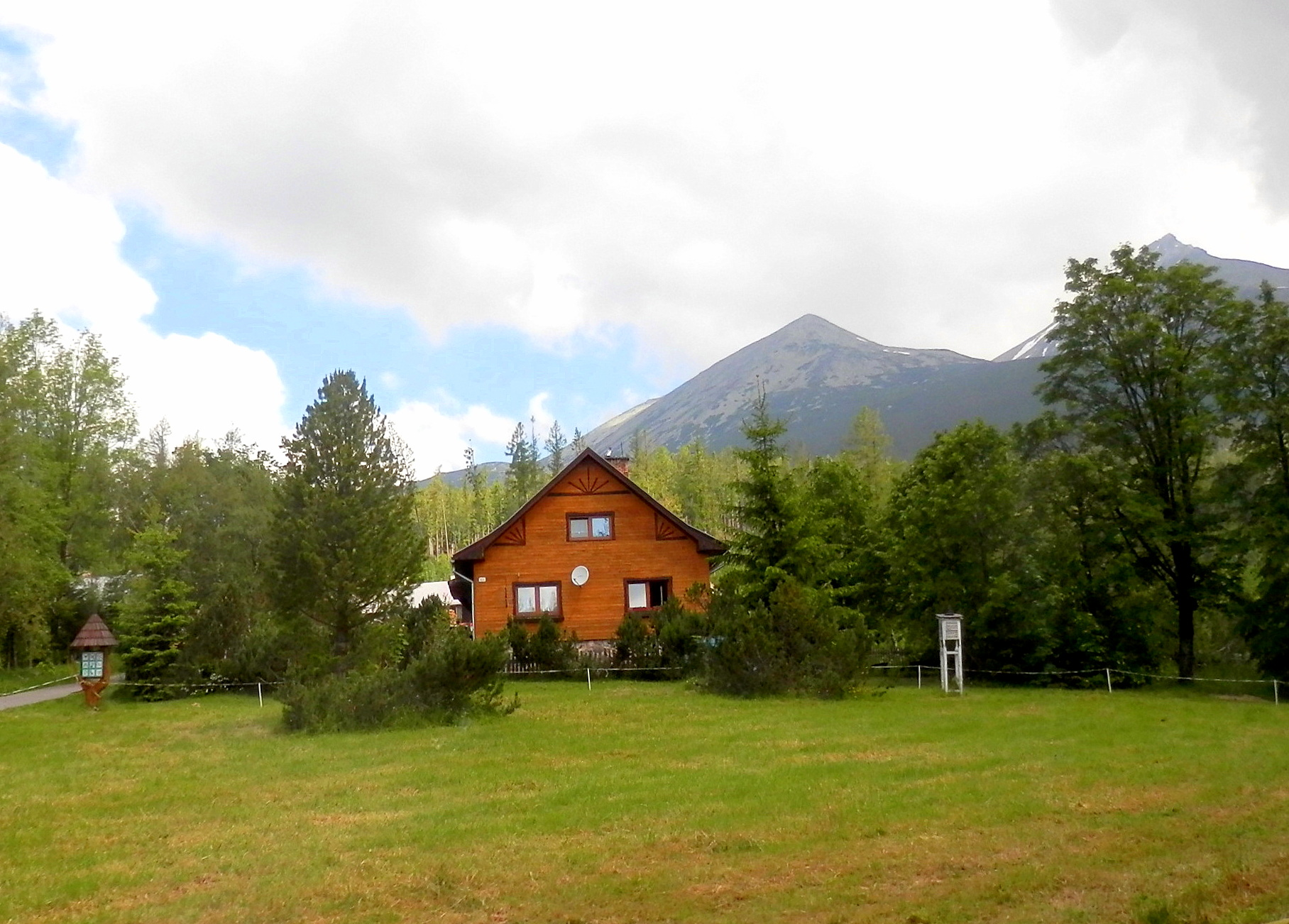 Hájovňa Vyšné Hágy, mesto Vysoké Tatry.